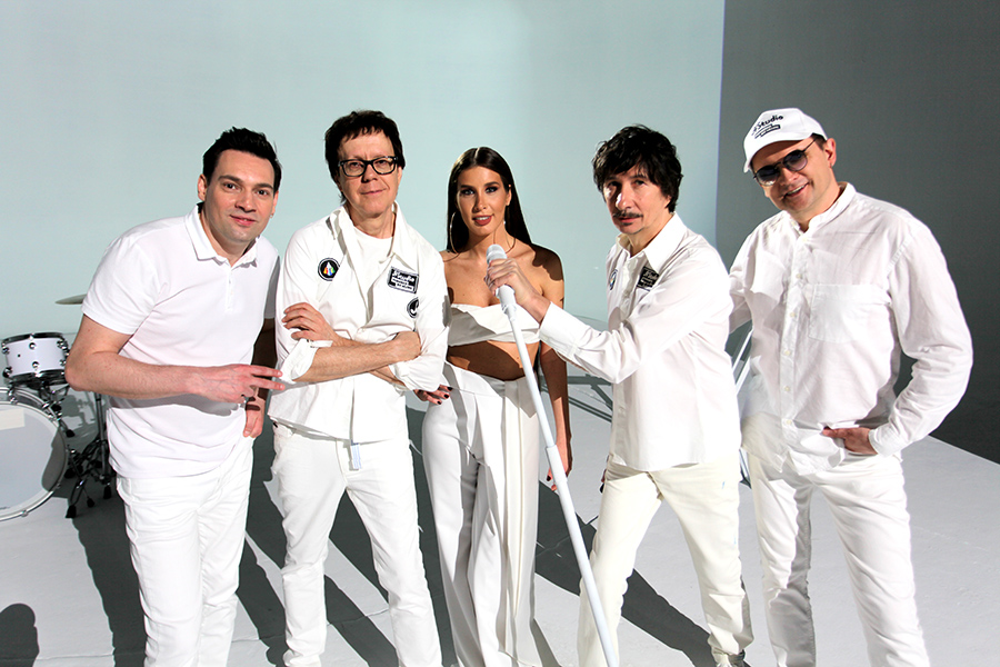 Группа A’Studio на съёмках клипа «Тик-так»